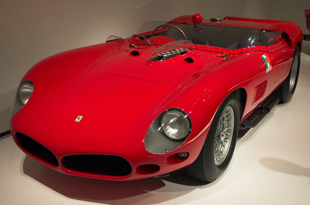 1961 Ferrari 250 TR 61 Spider Fantuzzi